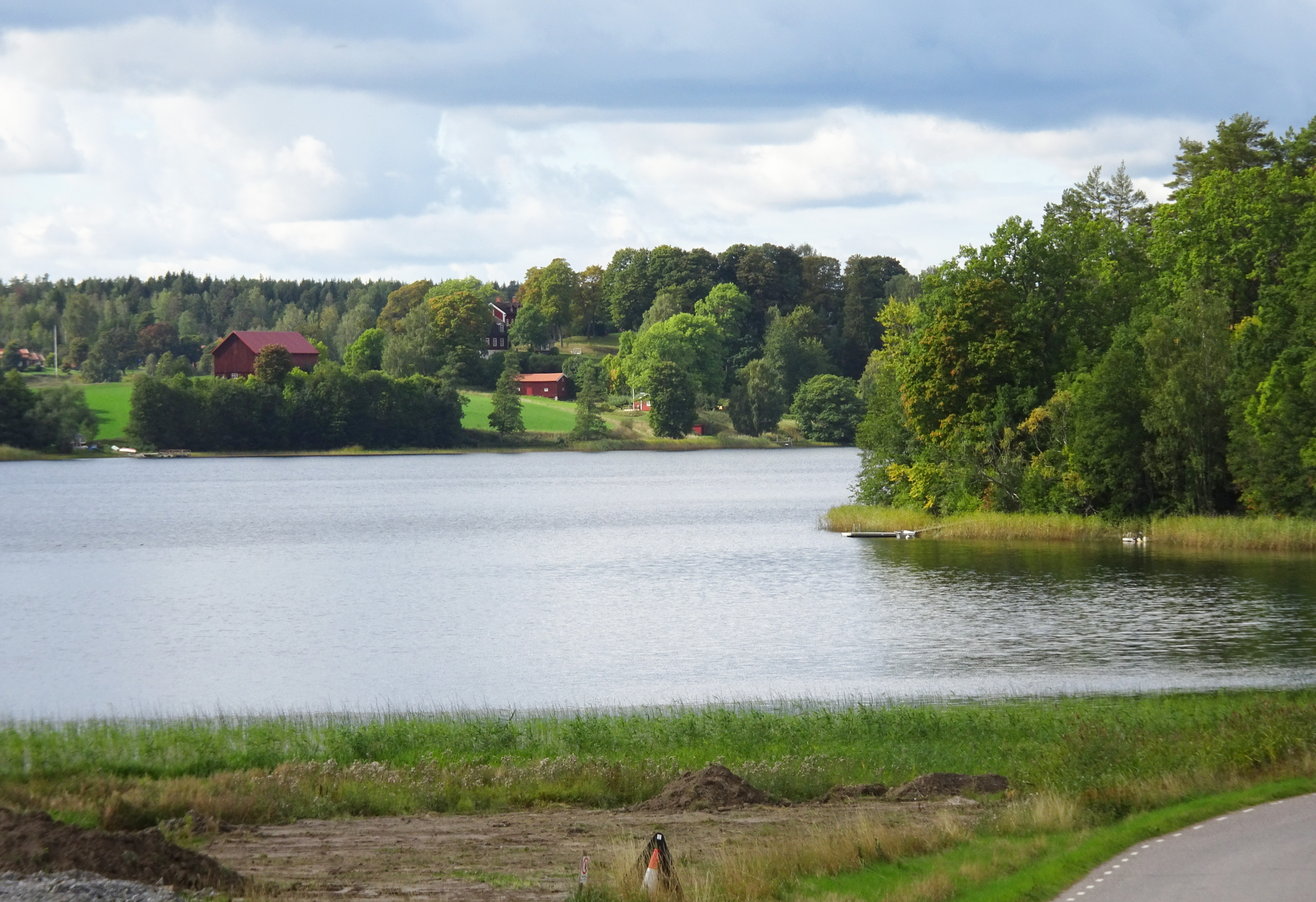 Kyrksjön (Gryts socken, Södermanland), vy från Gryt